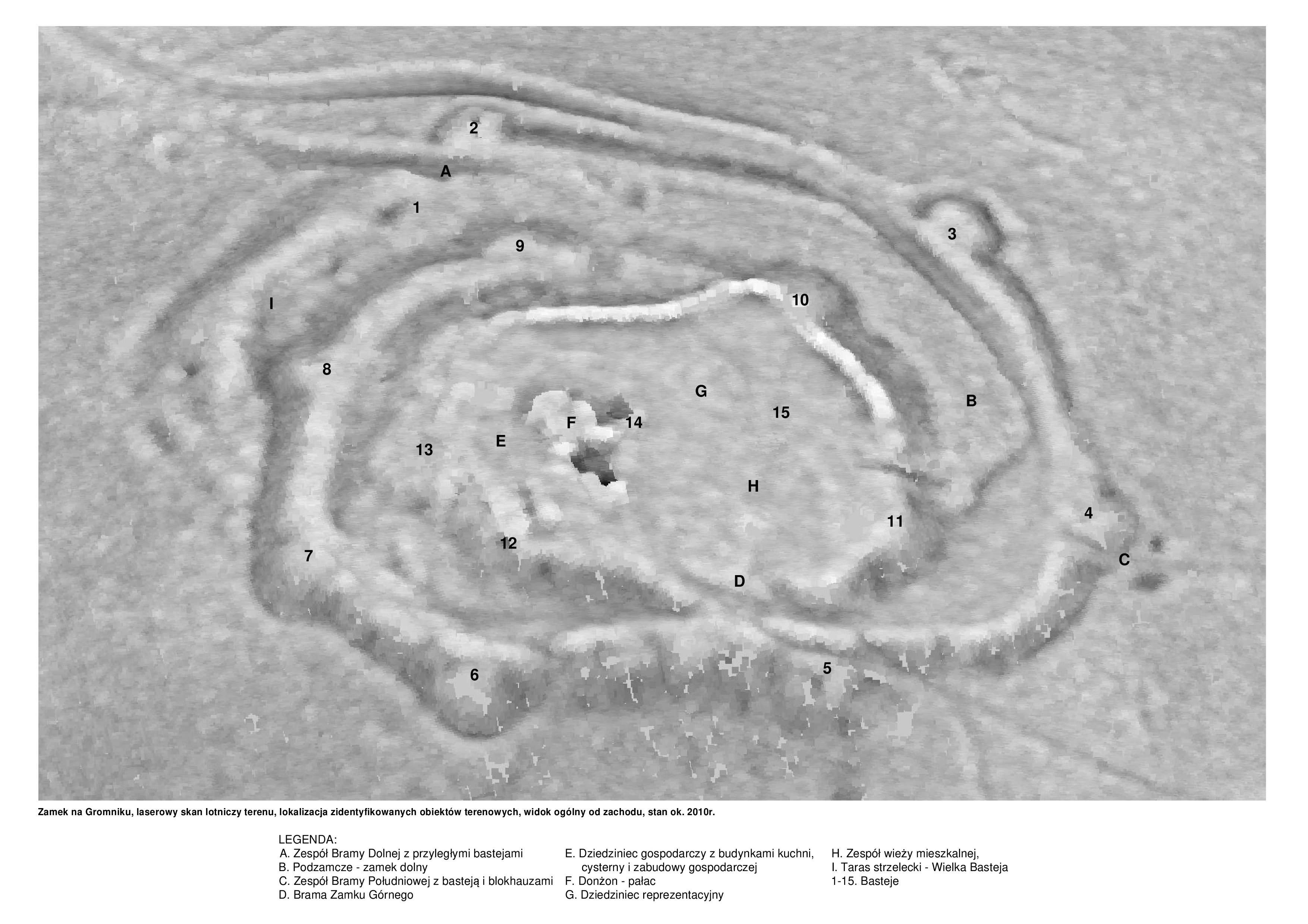 Wizualizacja skanu LIDAR z oznaczonymi zidentyfikowanymi elementami zamku na Górze Gromnik; autor R. Karnicki [w:] Próba rekonstrukcji przestrzennej XV w. Zamku na Gromniku w oparciu o zidentyfikowanej obiekty terenowe i wyniki badań archeologiczno - architektonicznych (2003-2018r.); [maszynopis w: Autorska Pracownia arch. Macieja Małachowicza], 2018